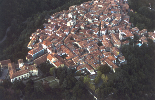 Donatore alla associazione La Lachera Archivio fotografico dell'associazione La Lachera I grant anyone the right to use this work for any purpose, without any conditions, unless such conditions are required by law.